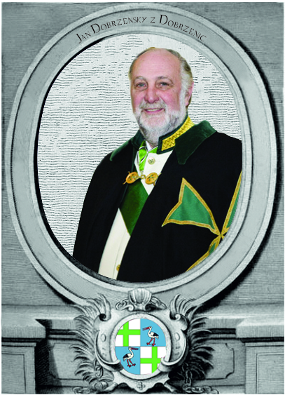 Erb 50. Veľmajstra rádu sv. Lazara - Jeruzalemského Jána Dobrzenského z Dobrzenic